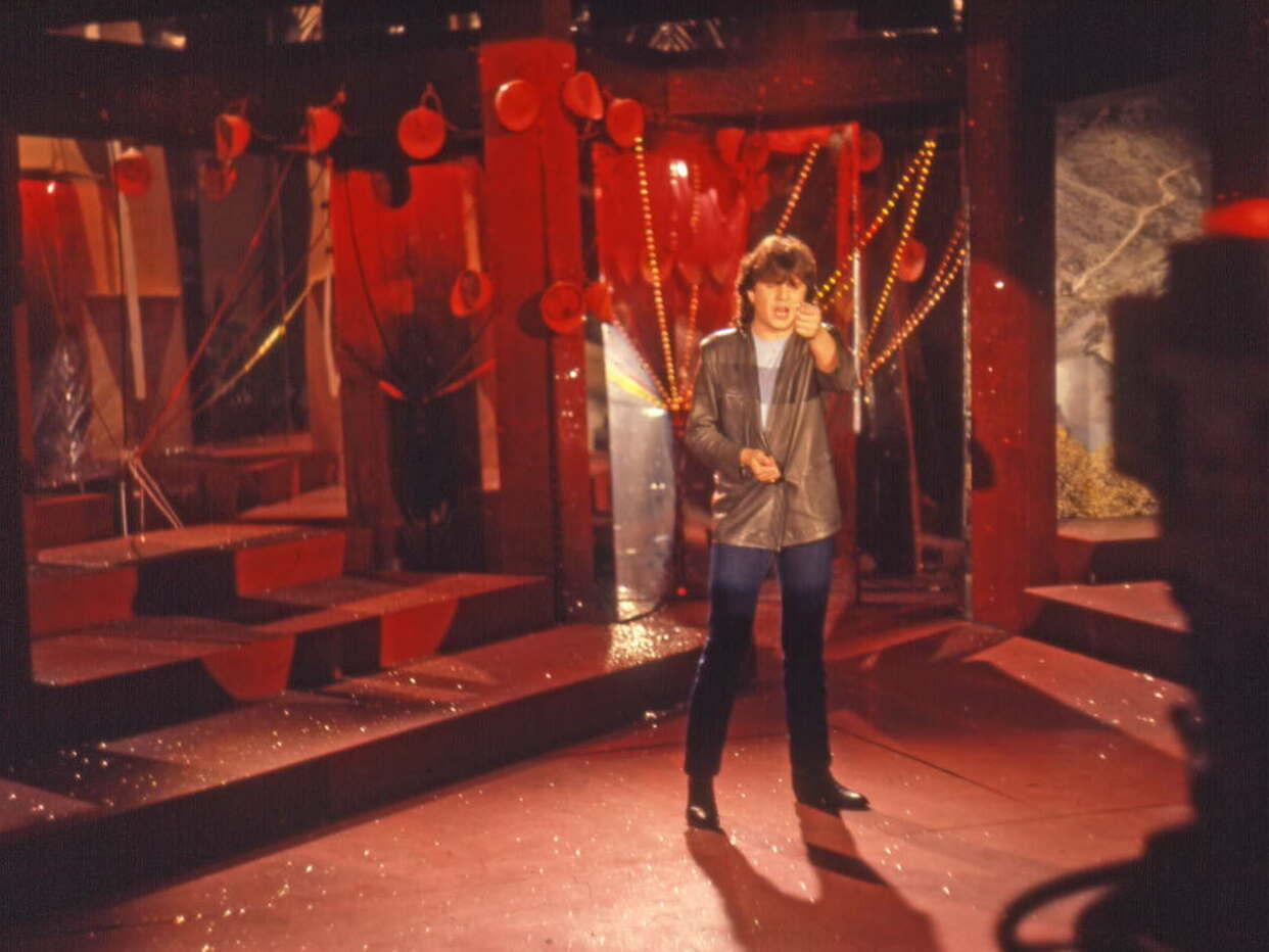 Daniel Balavoine interprète "Le Chanteur". L'émission en public est présentée par Danielle Gilbert.